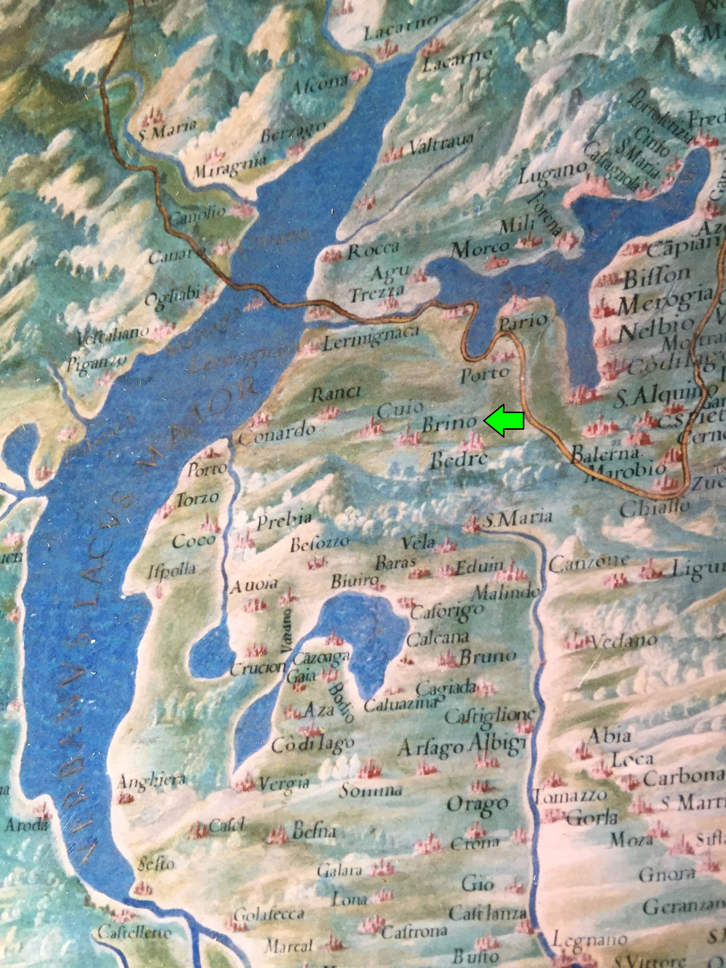 Dettaglio sulla carta Mediolanensis ducatus (Ducato di Milano) - Galleria delle carte geografiche - Musei Vaticani - Roma. La freccia punta sul comune di Brinzio (Brino)